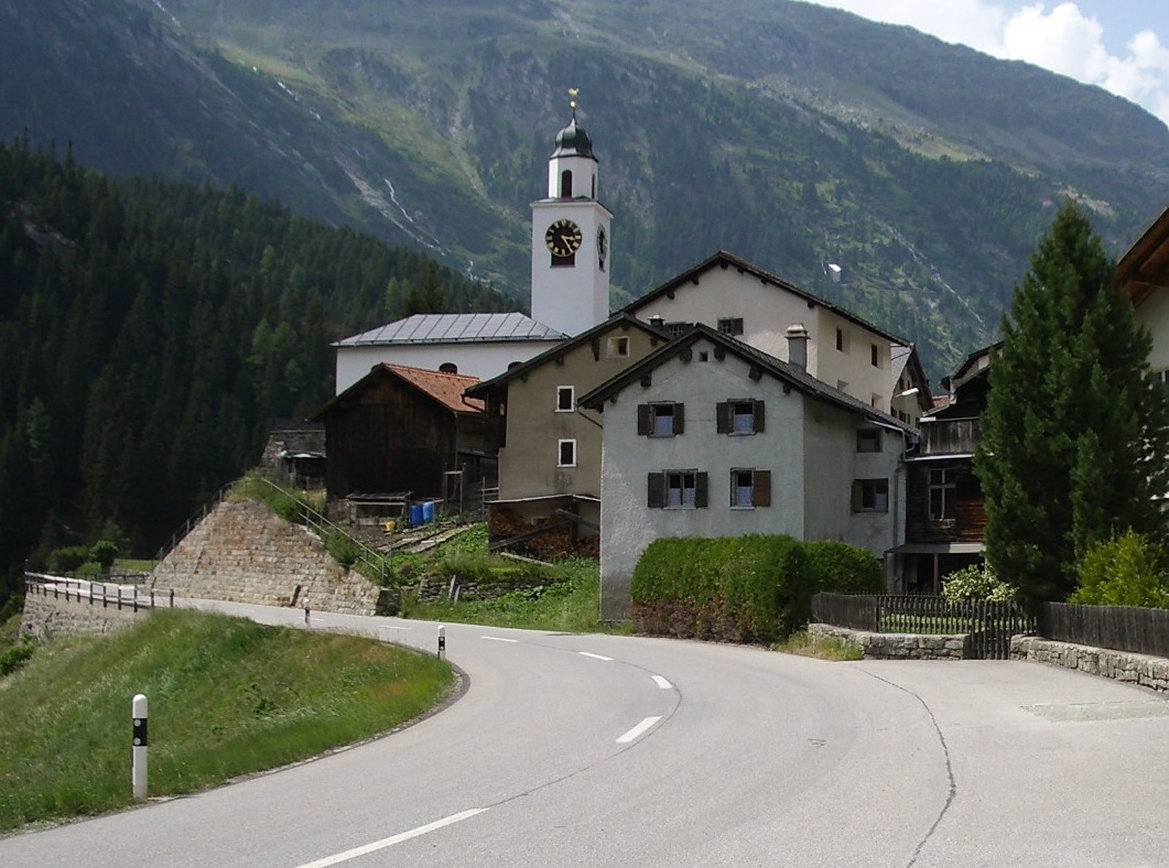 Innerferrera GR, Switzerland self-made, June 2006